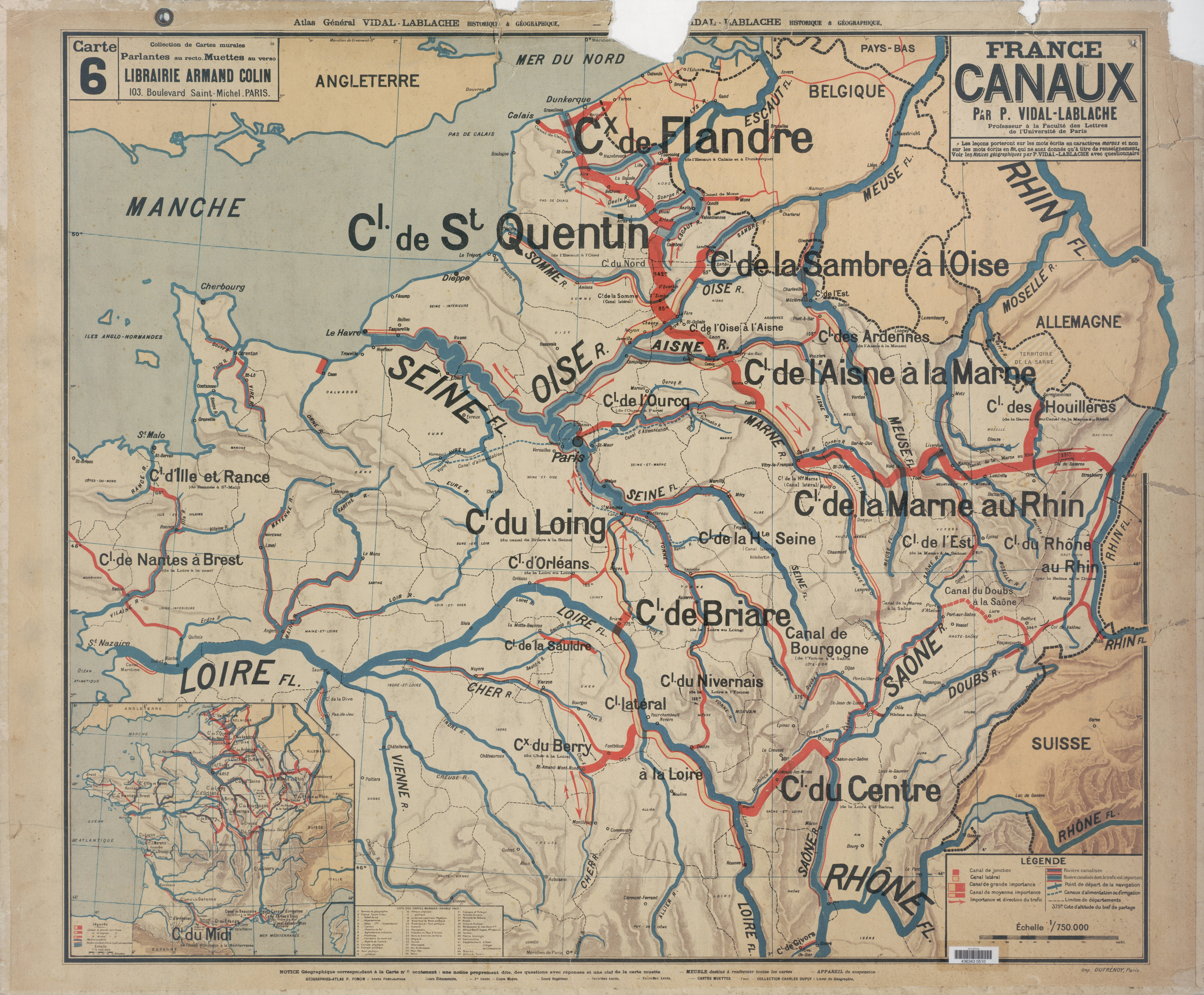 France. Canaux. Bibliothèque Numérique de l'Université d'Artois. Retrieved on 25 March 2016.